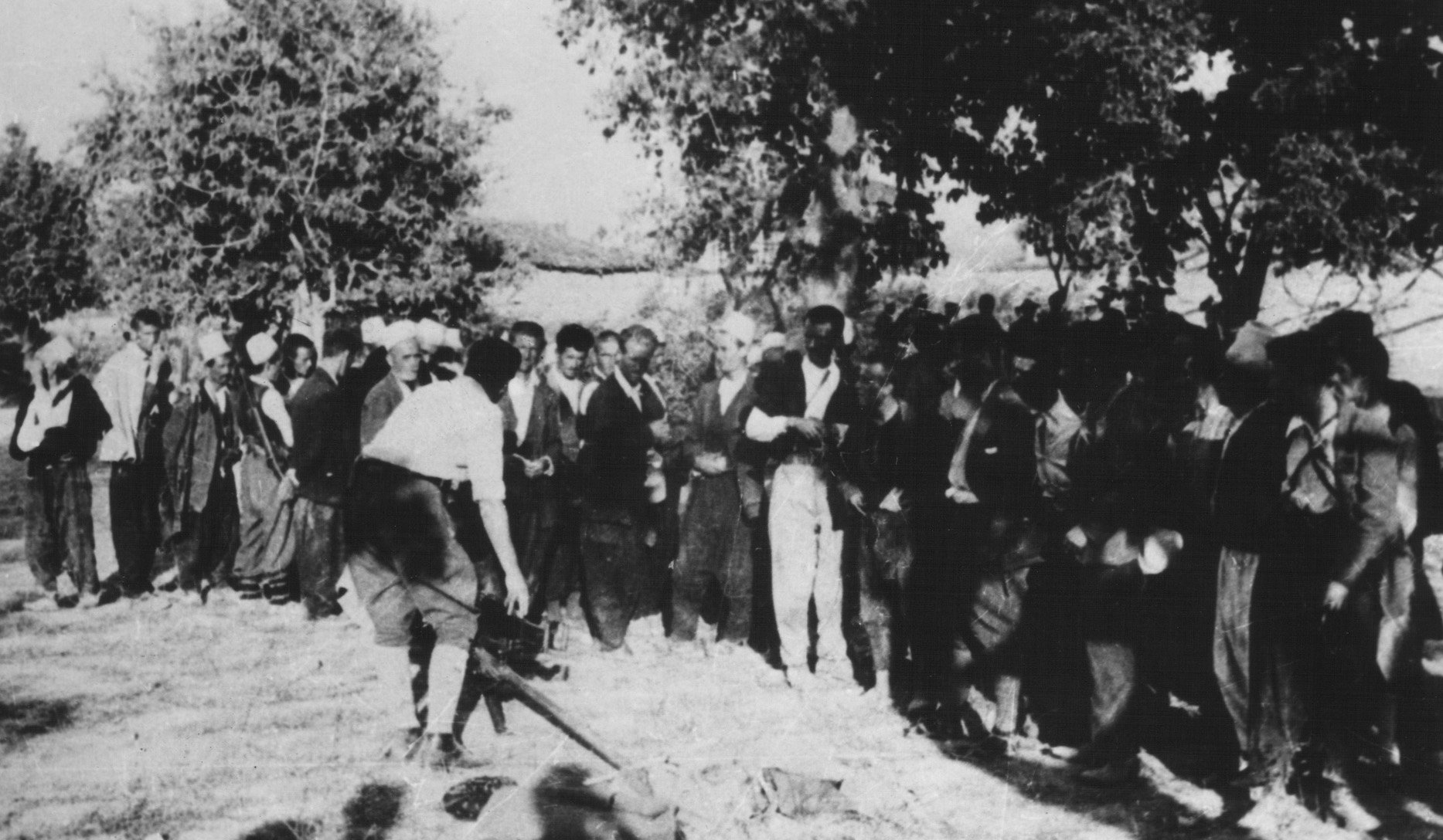 Srpskohrvatski / српскохрватски: Miladin Popović obučava albanske partizane u rukovanju oružjem, Albanija 1943. godine.